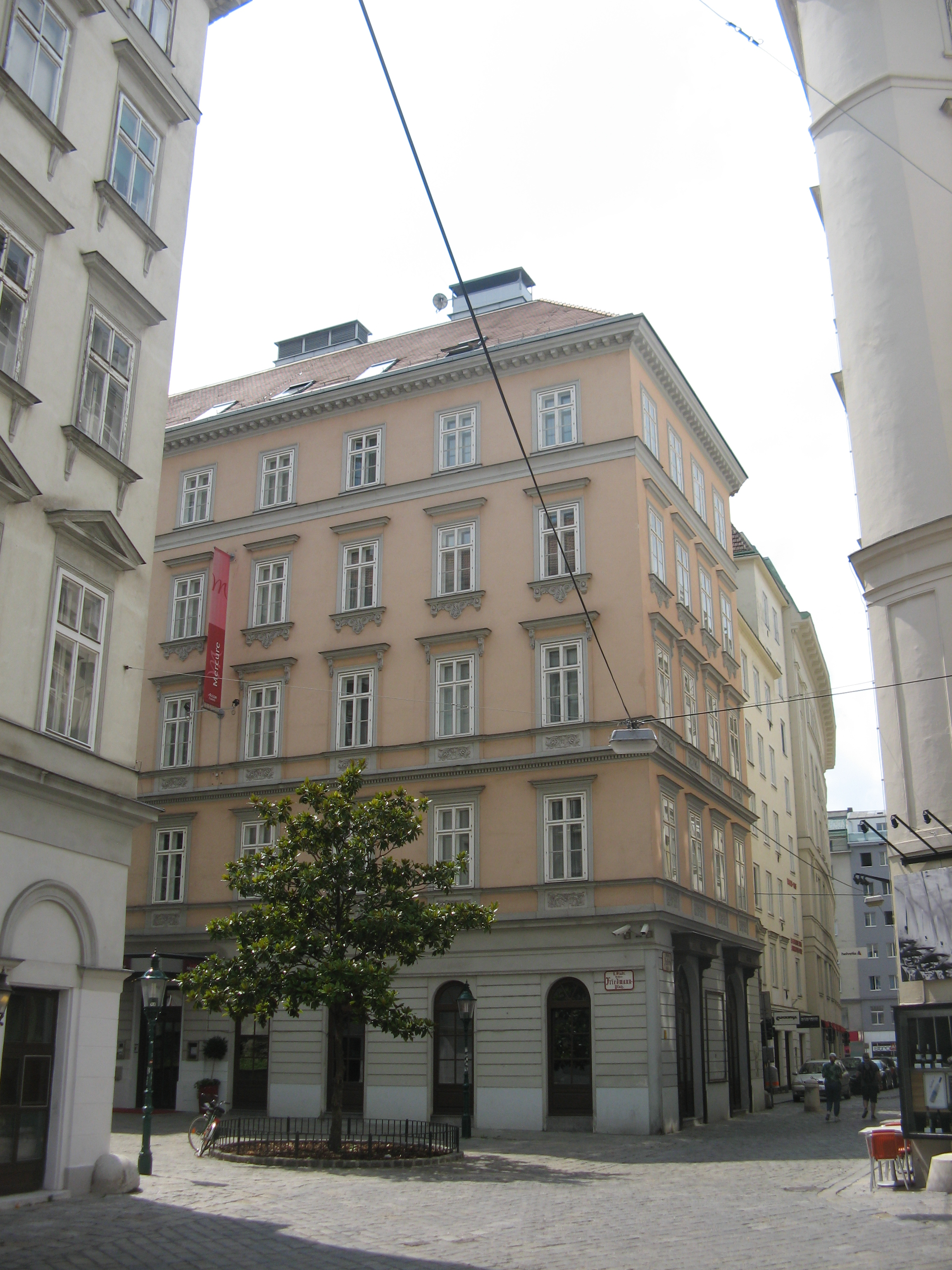 Haus Nr. 2 (1844) von Karl Högl, Desider-Friedmann-Platz, Wien-Innere Stadt